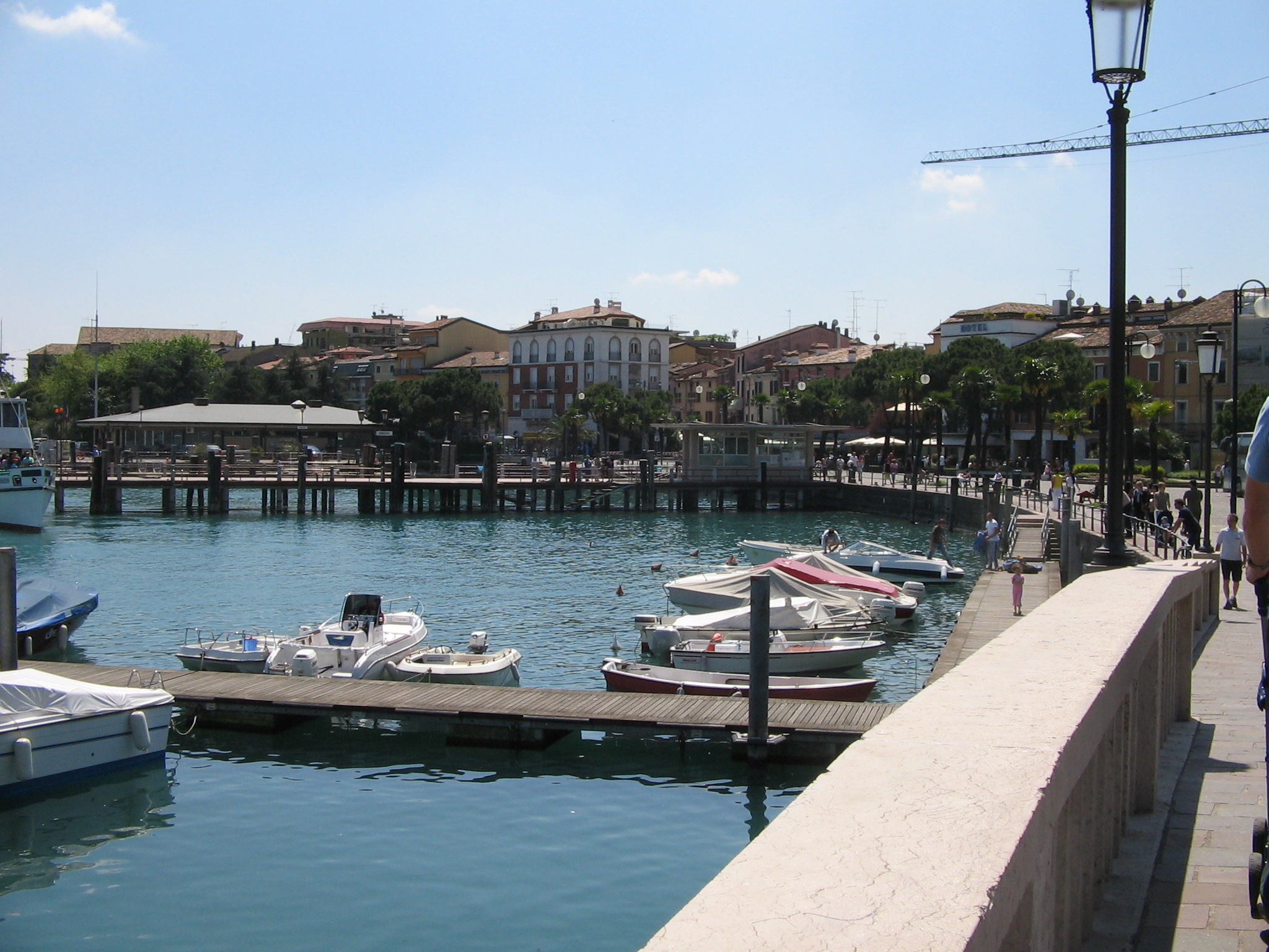 Hafenpromenade in Dezenzano am Gardasee